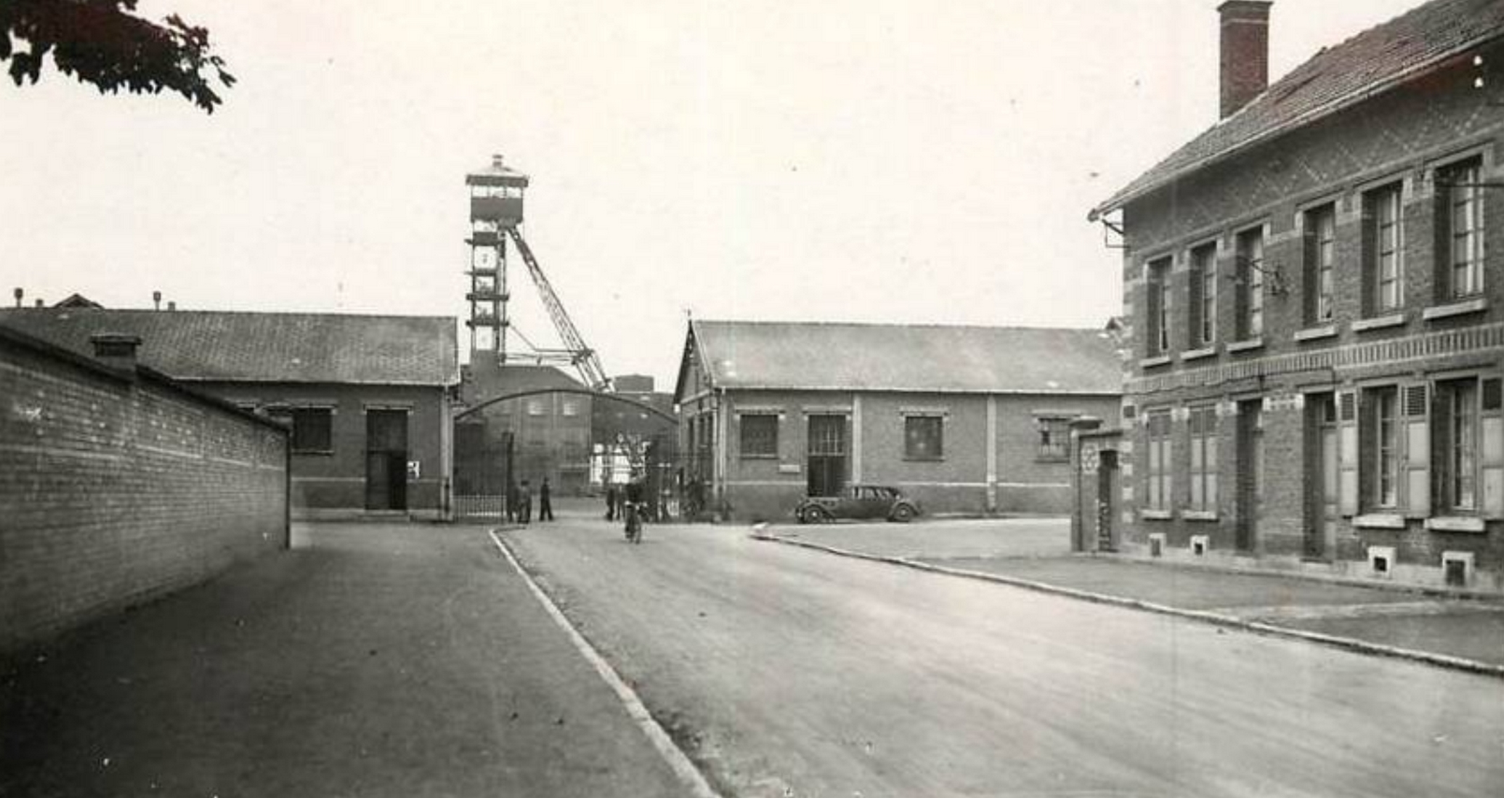 La Fosse n° 23 dite Thellier de Poncheville de la Compagnie des mines de Courrières était un charbonnage constitué d'un seul puits situé à Noyelles-sous-Lens, Pas-de-Calais, Nord-Pas-de-Calais, France.